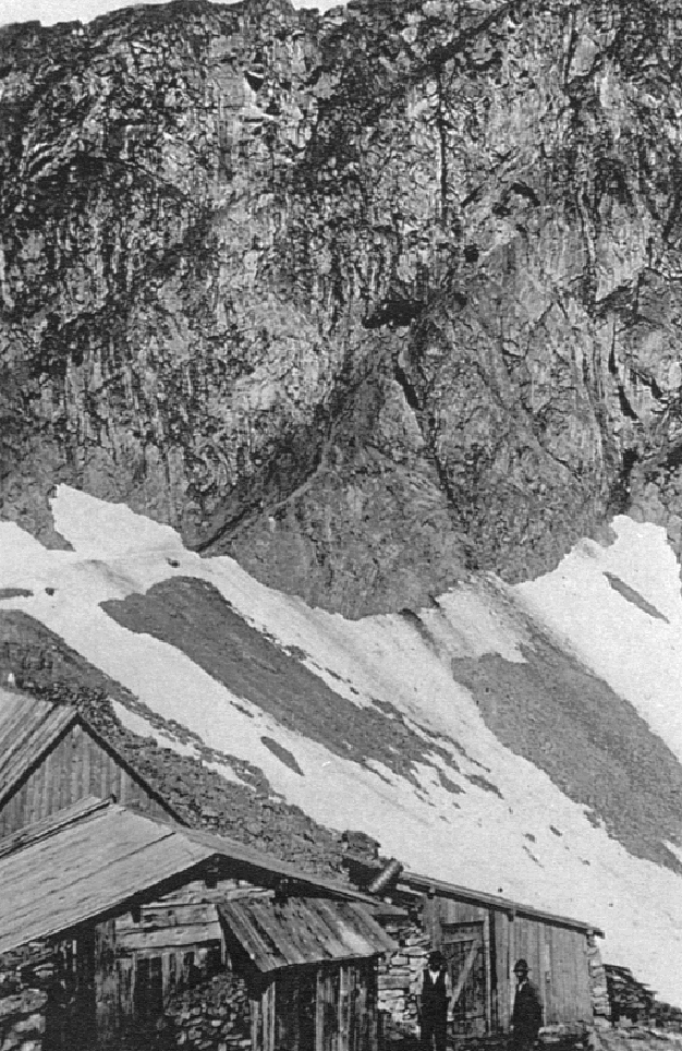 Knappenhaus an der Zinkwand (Lungau) um 1920